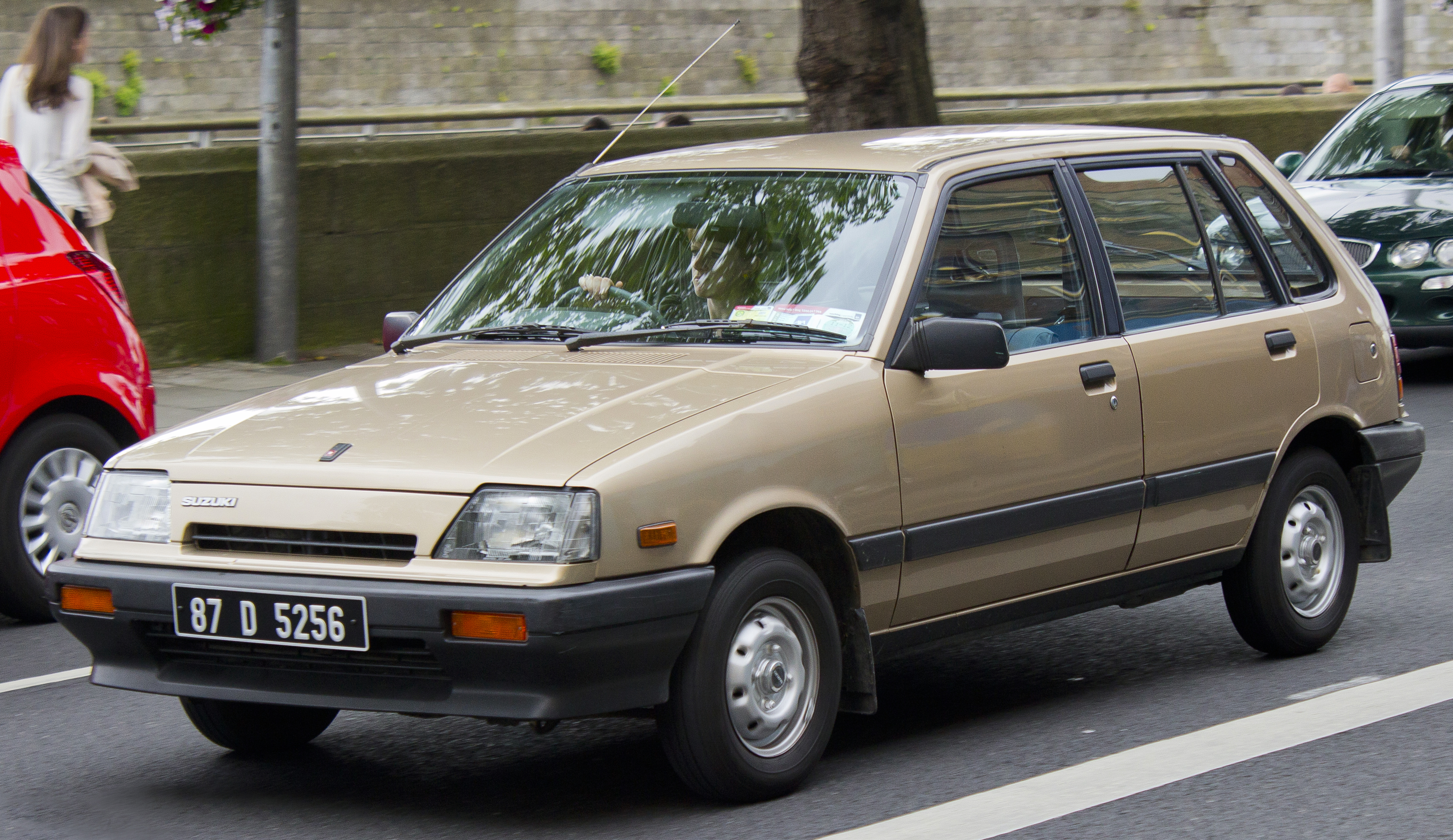 Best looking Swift ever?